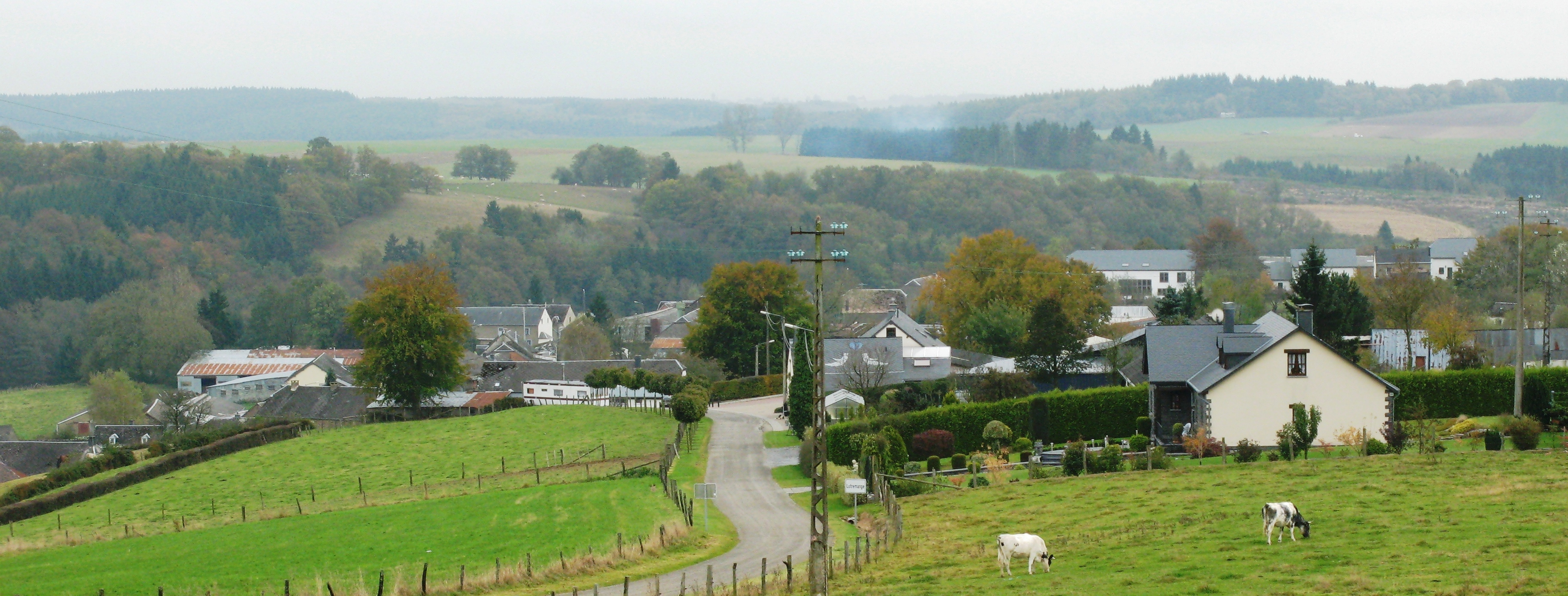 Vue sur Lutremange